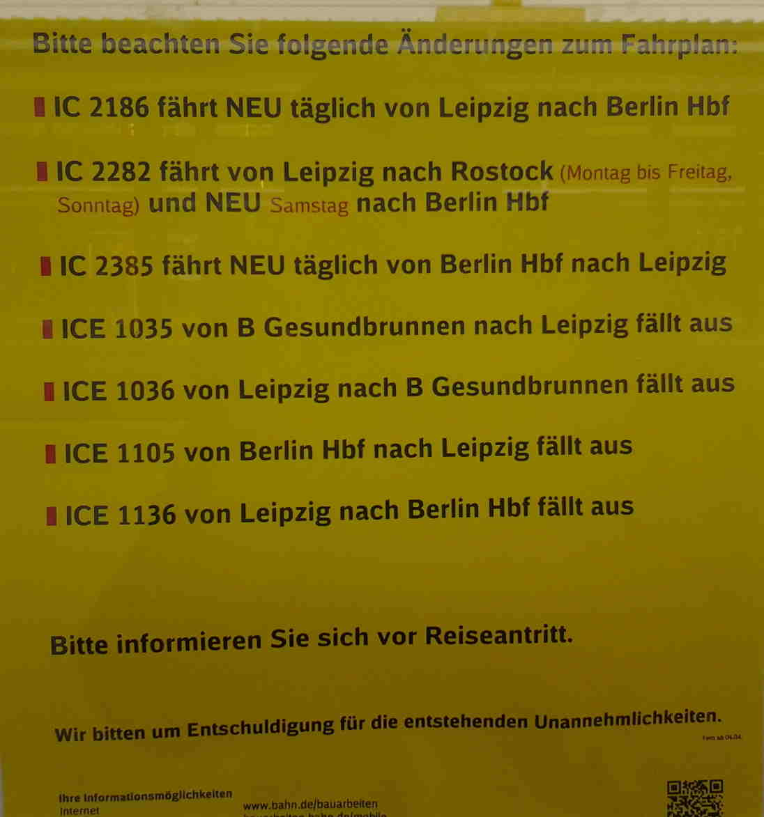 Fahrplanänderungsaushang in einem Informationskasten auf einem Bahnsteig im Bahnhof Berlin Gesundbrunnen zum Thema ICE-Metropolitanverkehr